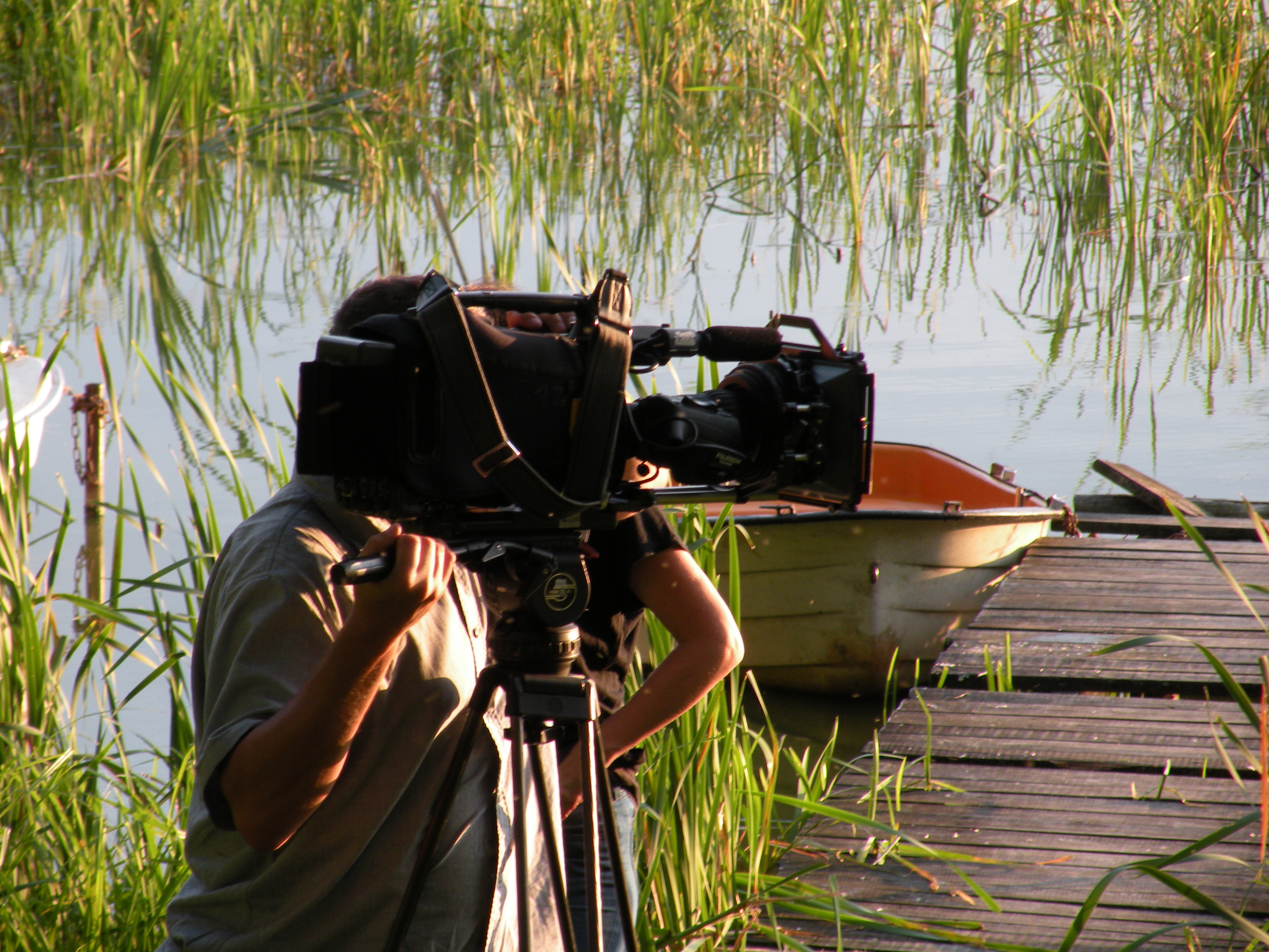 Tomasz Michałowski, Ekipa filmowa programu Dzikiej Polski w trakcie filmu o chruścikach, lipiec 2013, Łajs.